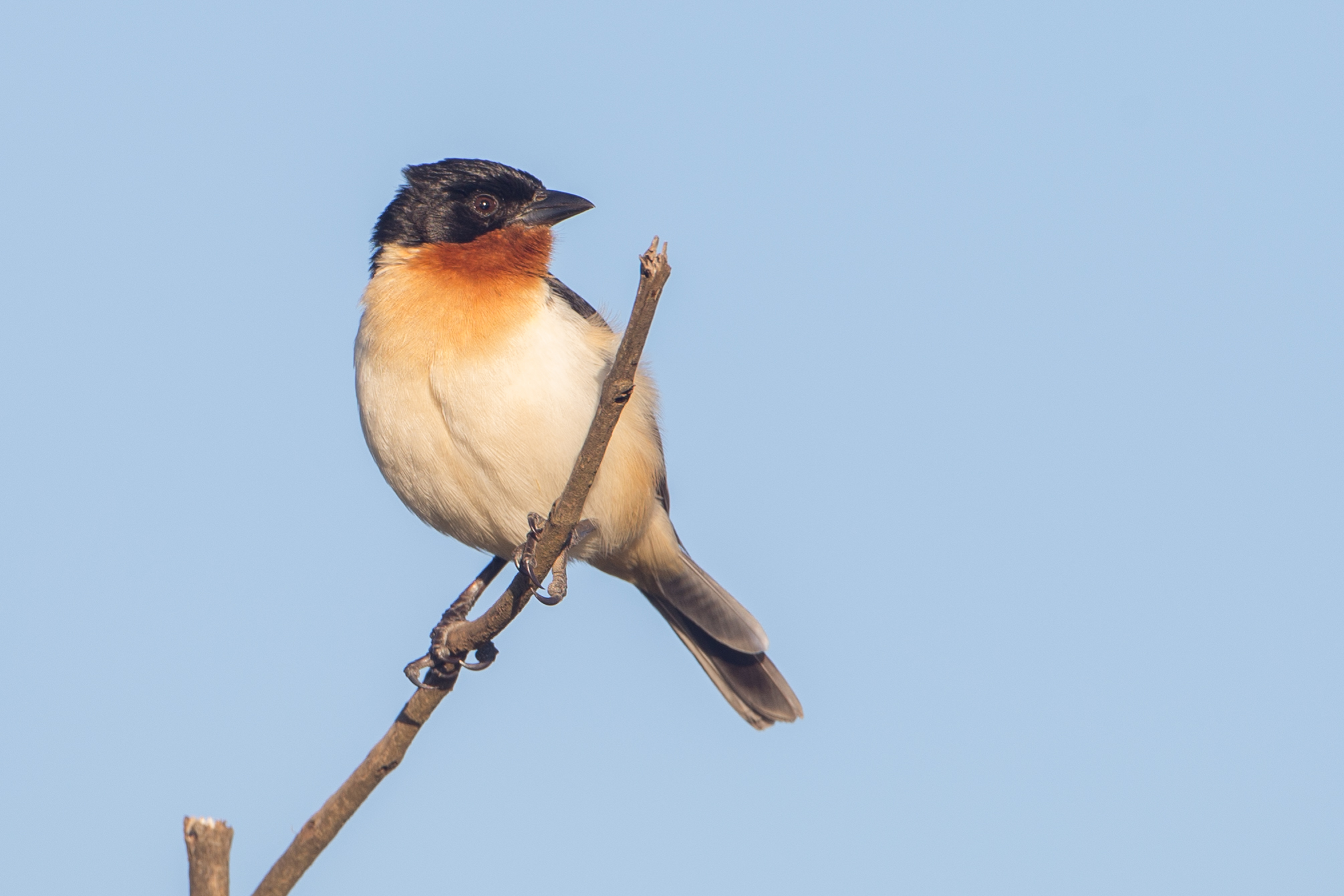 Bandoleta (Cypsnagra hirundinacea) no Parque Nacional da Serra da Canastra